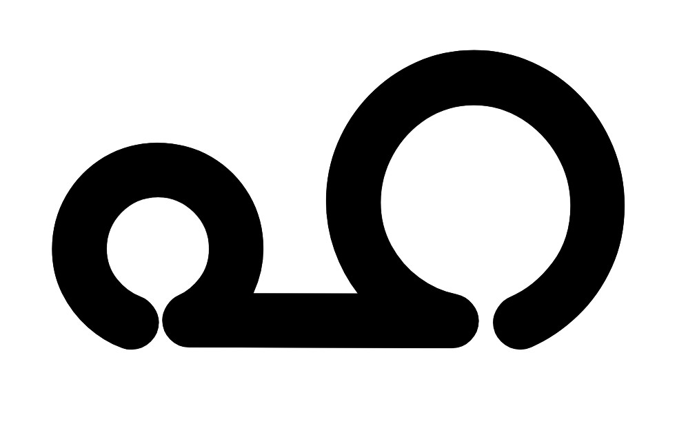 ഹ മലയാളം അക്ഷരം